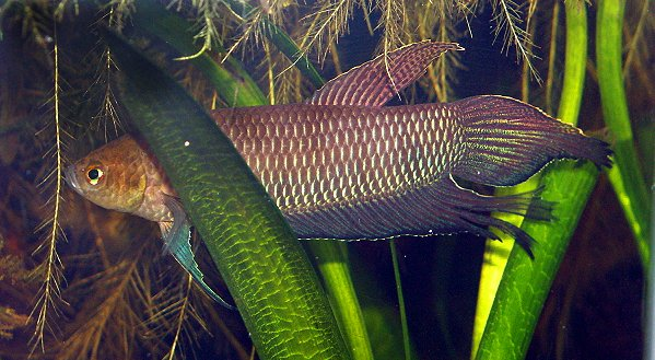 Betta simorum male